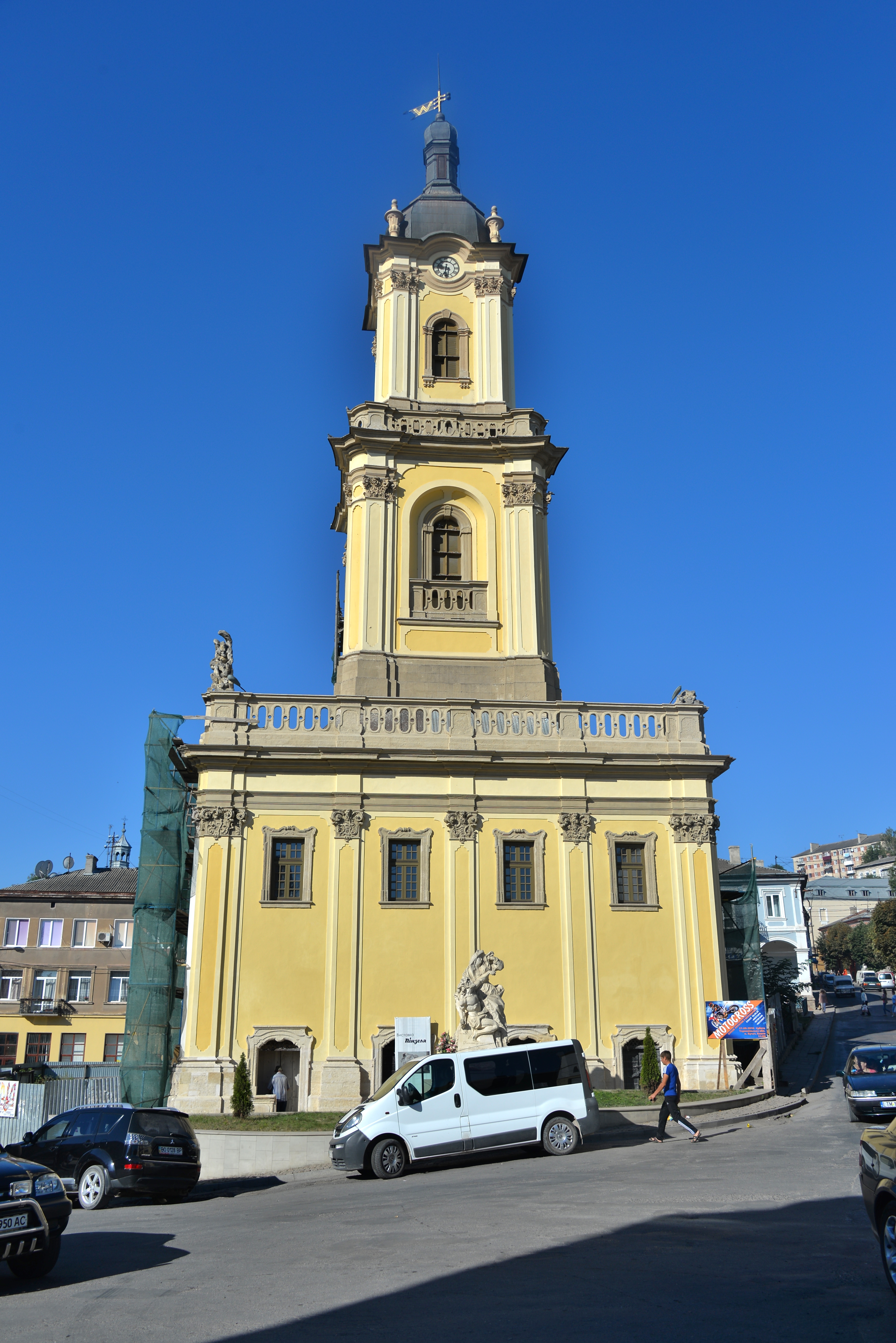 Ратуша (мур.), Бучач, майдан Волі